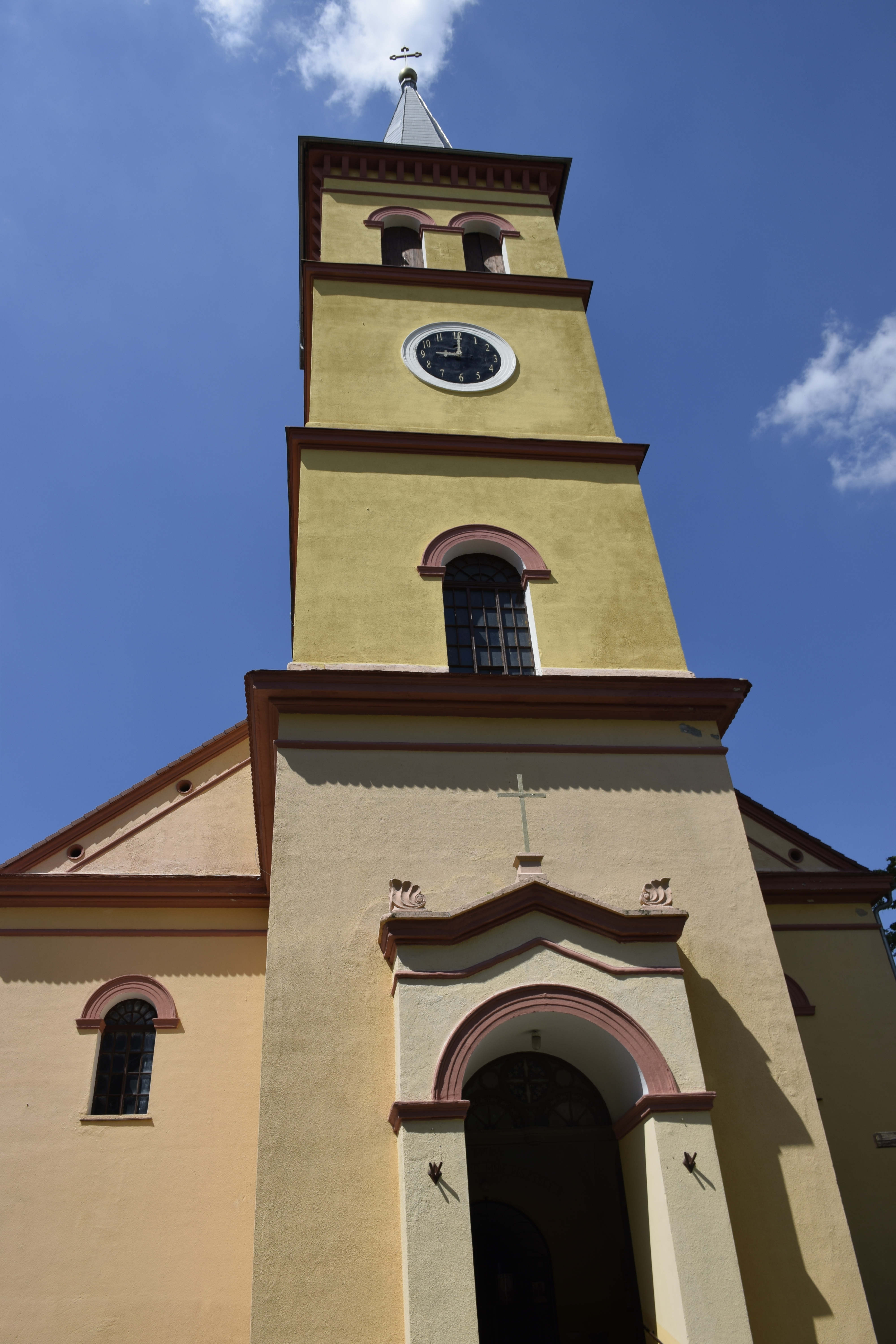 Wierzchosławice (województwo dolnośląskie). Polska.